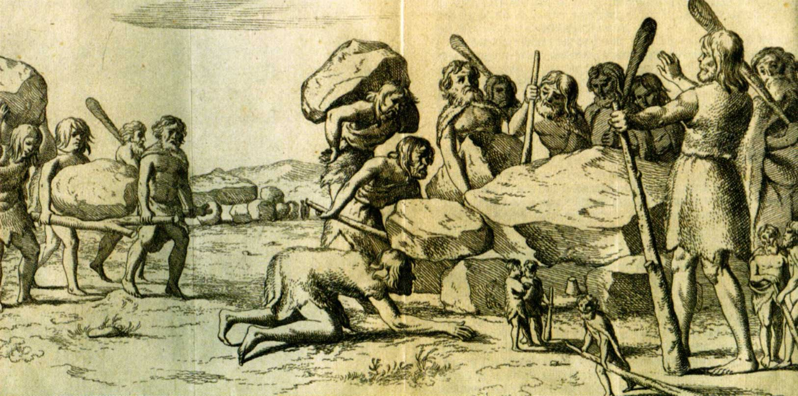 Hunebedbouwers gravure in de geschiedenis van Drenthe (Annales Drenthia) door J. Picardt